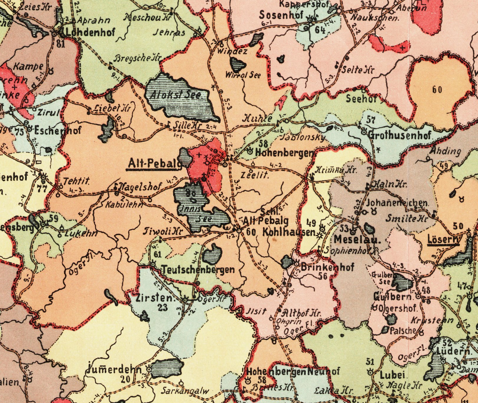 Võnnu kreisi Vecpiebalga kihelkonna mõisad 1903. aasta kaardil.